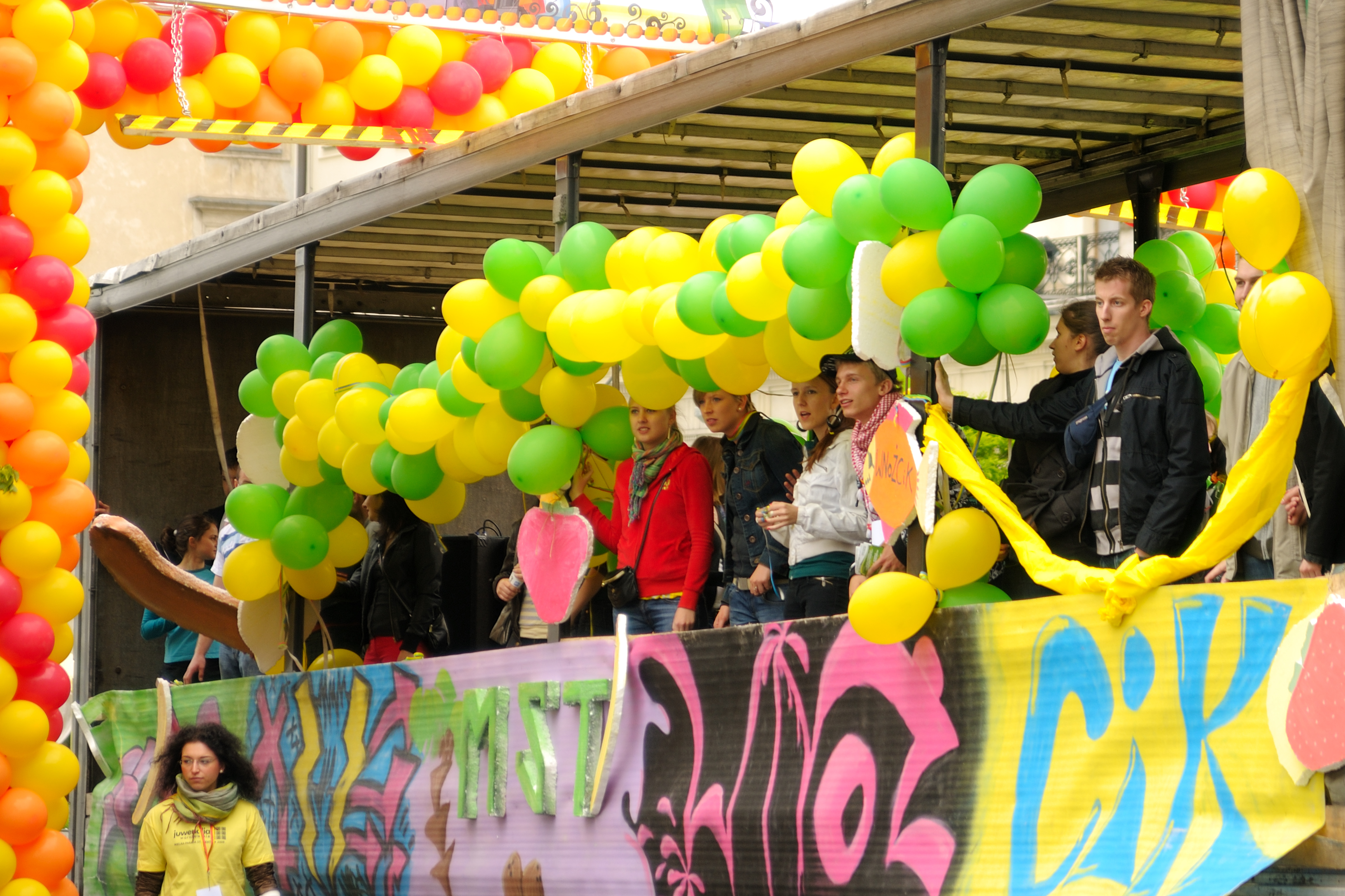 Wielka Parada Studentów Juwenalia Warszawskie 2009